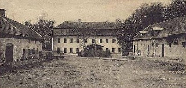 Zámeček